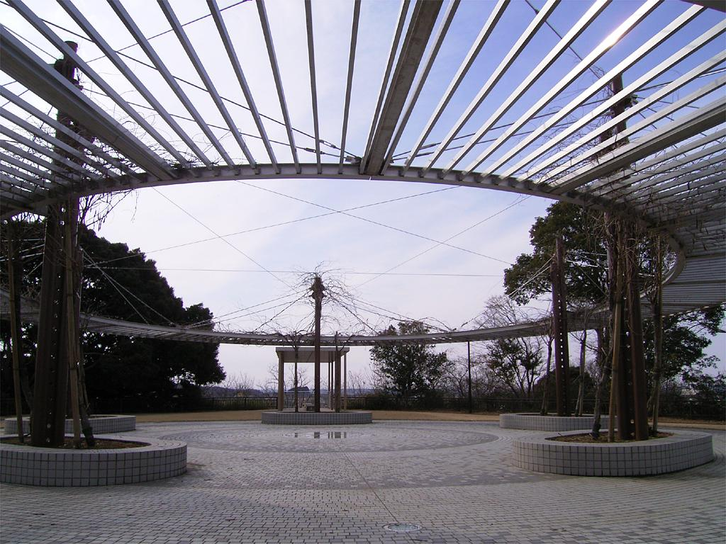 Kioroshi Park